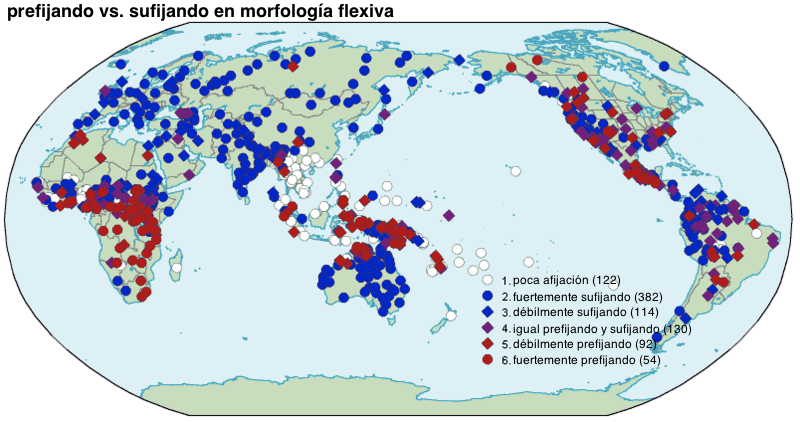 Este mapa ha sido traducido de inglés a español. La versión original está aquí